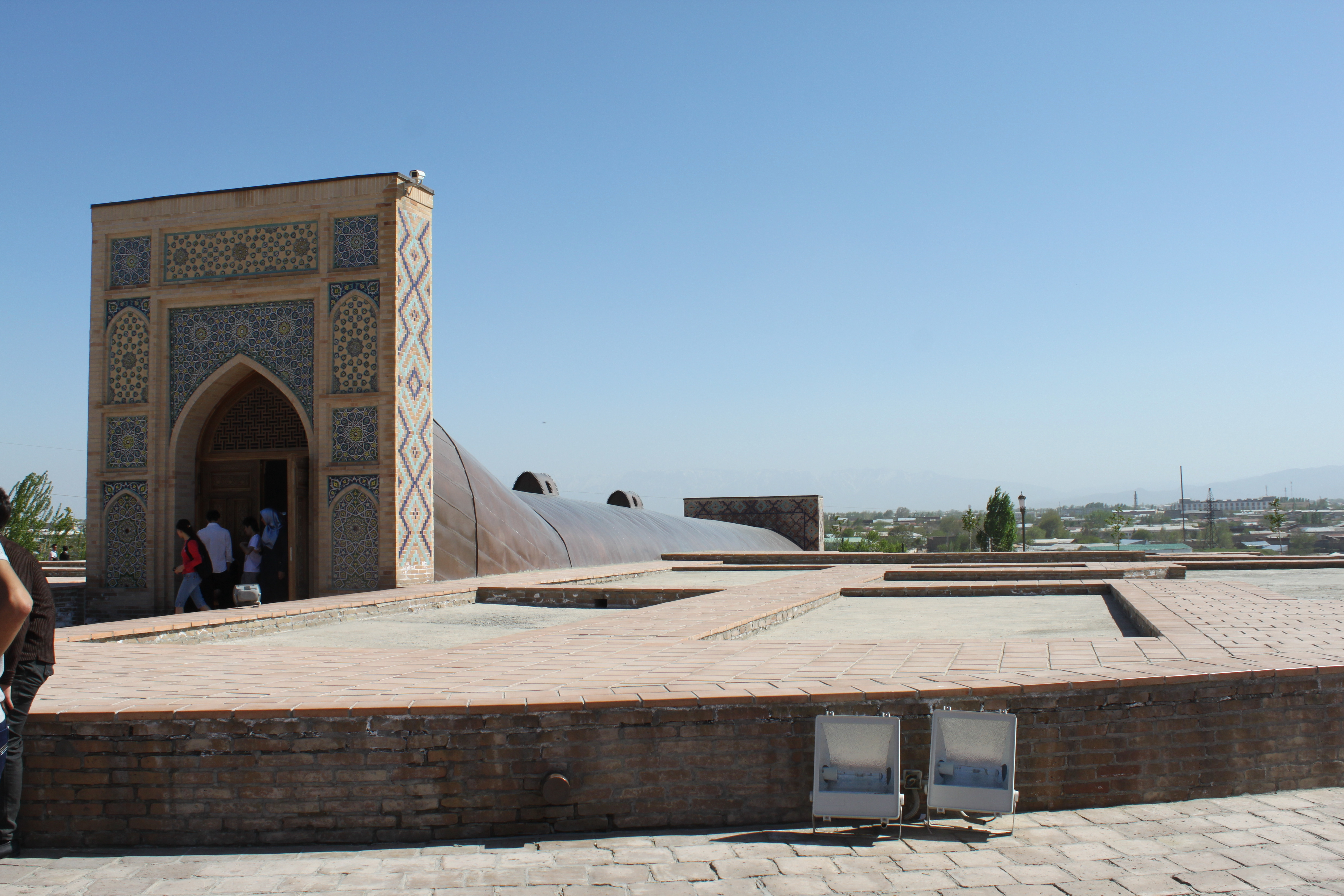 vue de l'observatoire